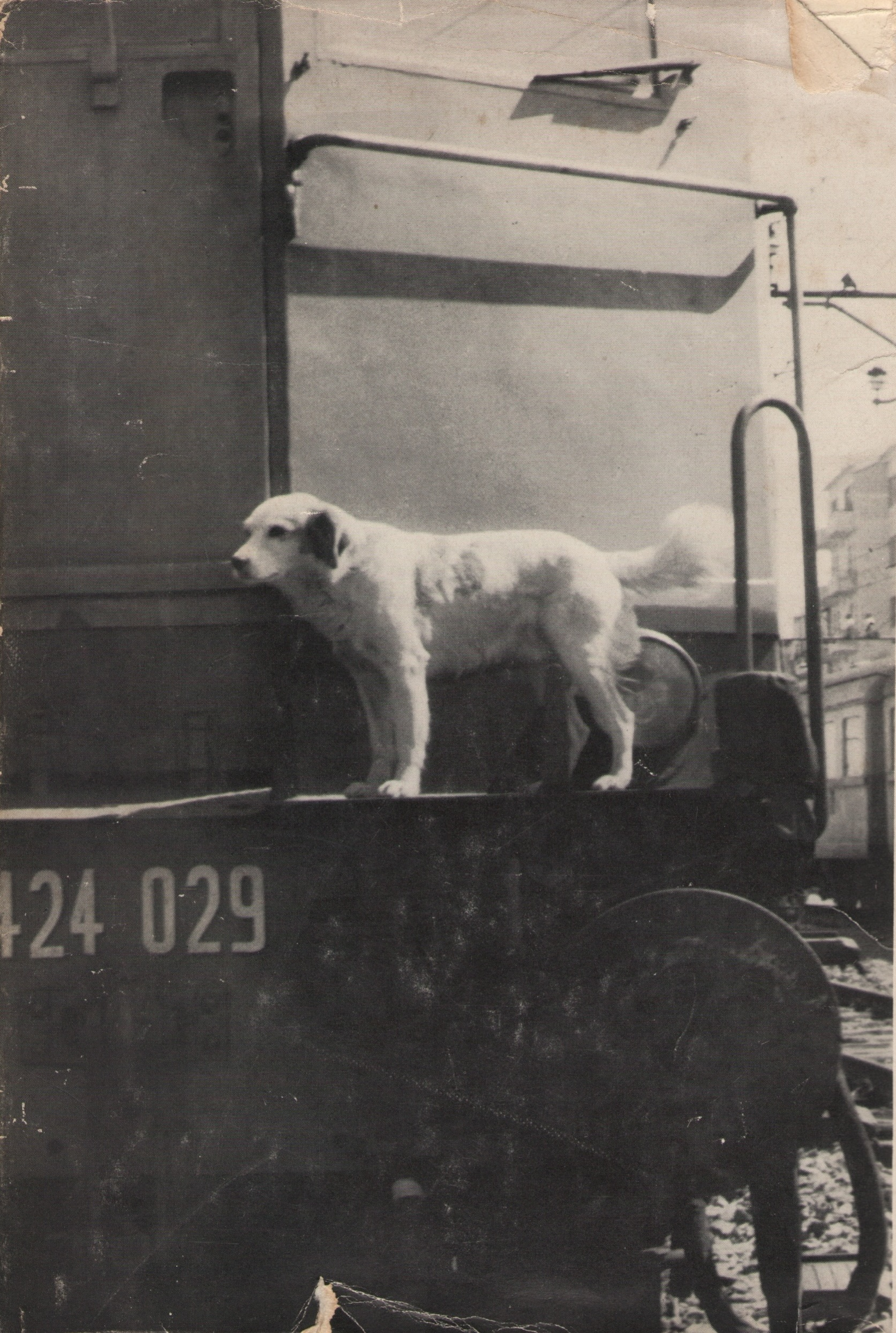 Lampo